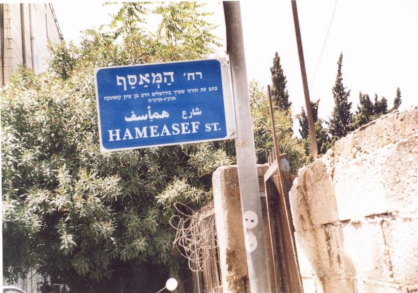 Jérusalem ouest - Quartier Romema - rue 'HaMeasef'